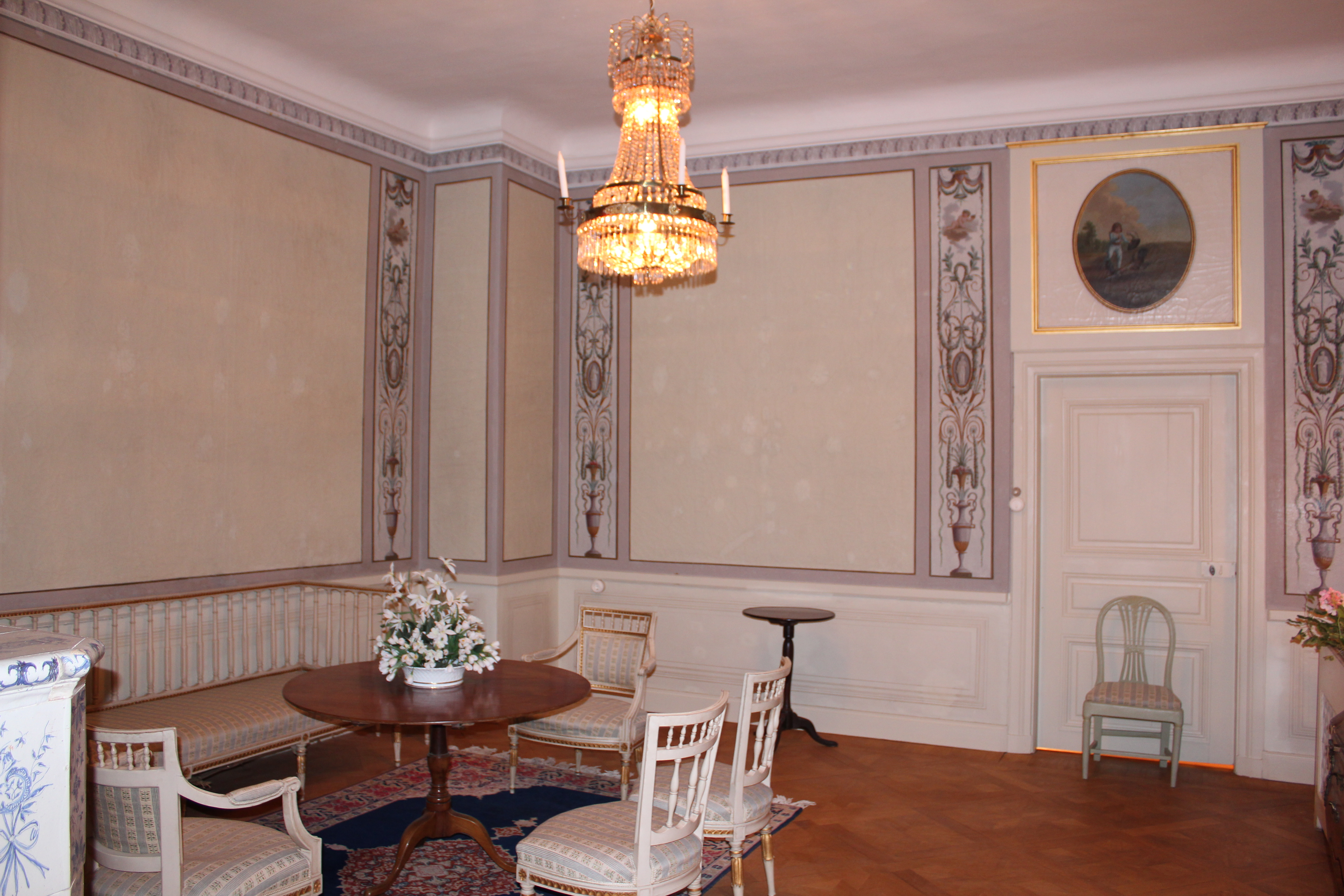 Stjärnsunds stora herrgård, Hedemora kommun, Sverige